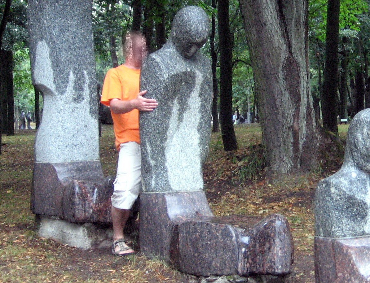 Ilustrační fotografie k encyklopedickému článku statuofilie